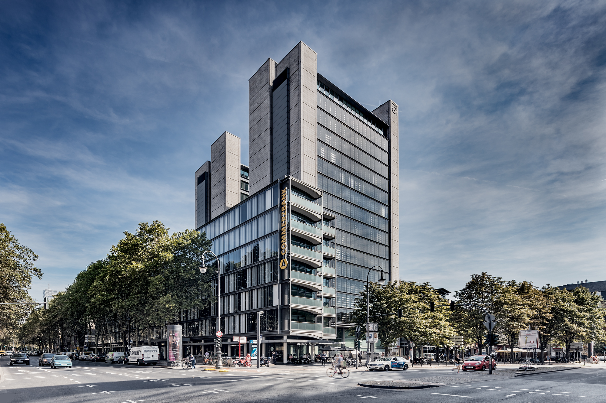 Die Zentrale der PlusServer GmbH ist im Ringkarree in Köln untergebracht.